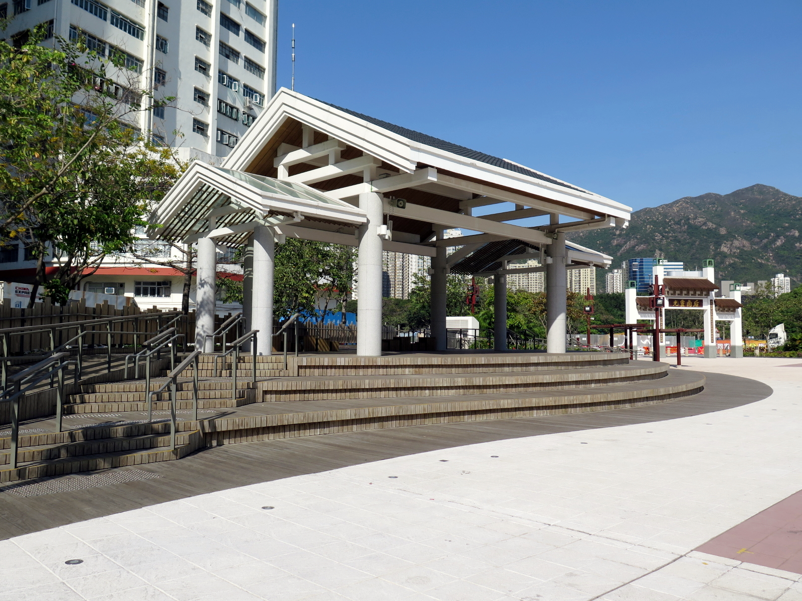 Tuen Mun Tin Hau Temple Square Pavilion